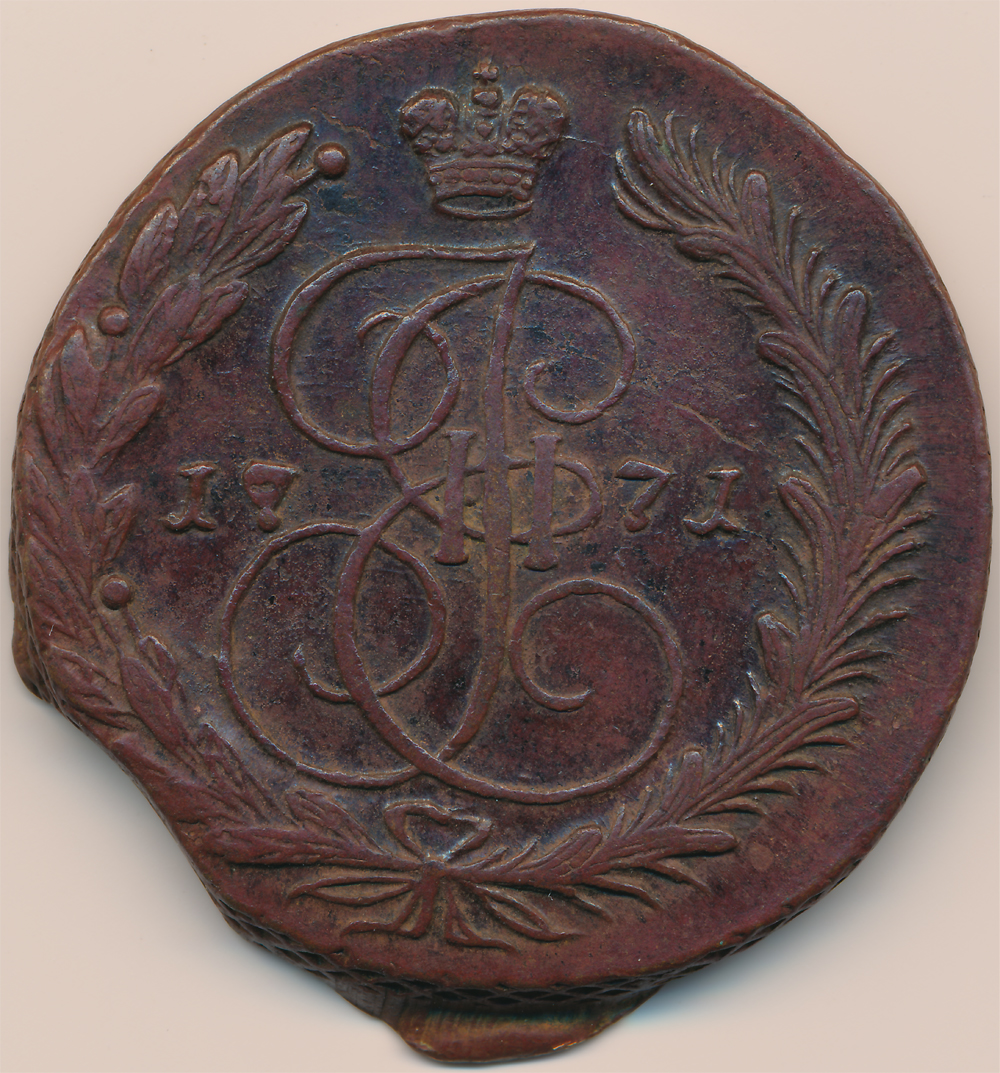 Пример монетного брака - выкус.